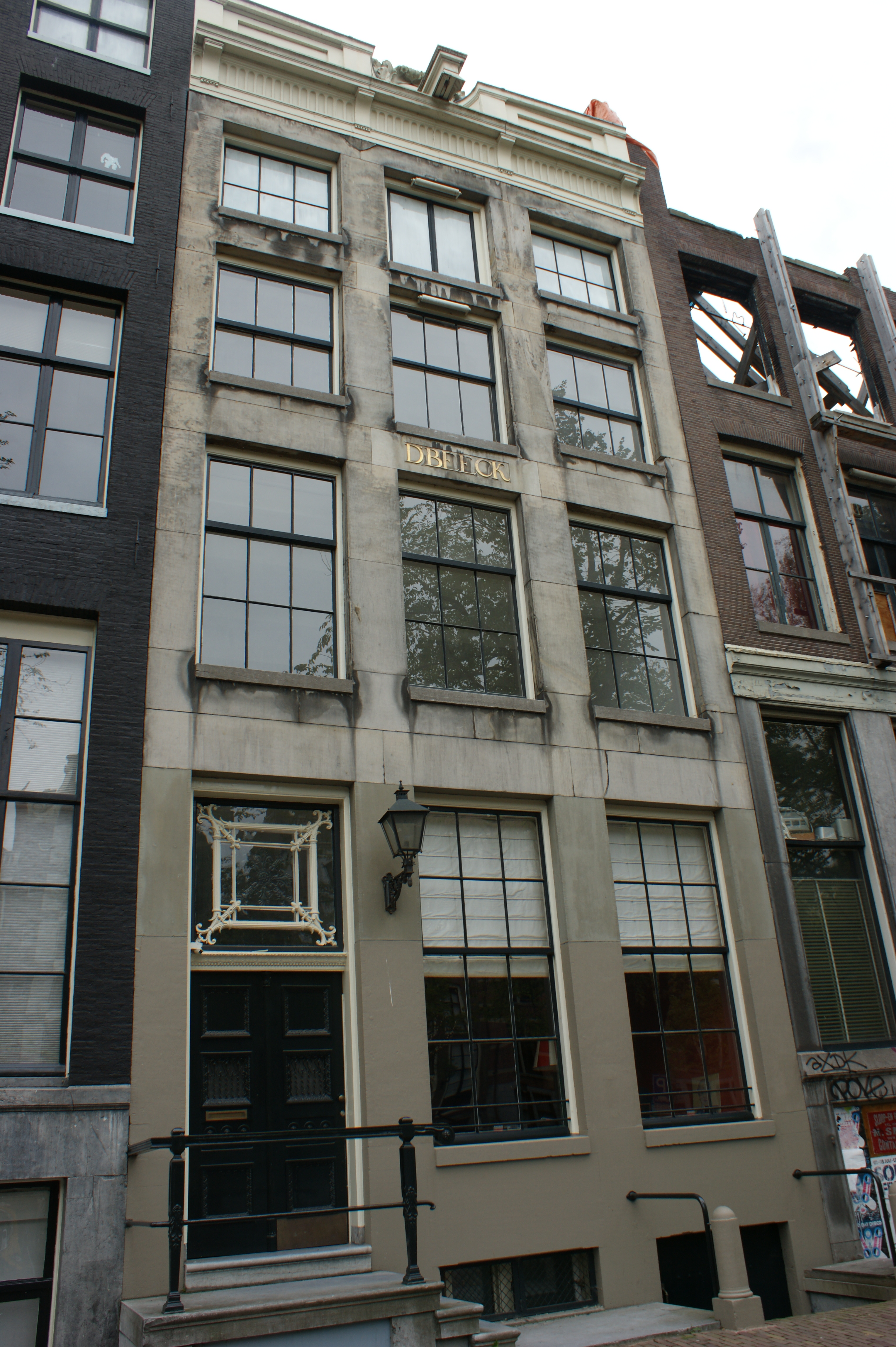 Amsterdam, Herengracht 136-134. In dem Gebäude Herengracht 134 führt nach den Ersten Weltkrieg Friedrich ("Fritz") Bernard Gutmann (* 15.11.1886 Berlin bis † 01.05.1944 ermordet Theresienstadt) die Bank Proehl & Gutmann, eine Tochterbank der Dresdner Bank AG. 1933 kündigte die Dresdner Bank den Vertrag mit dem Bankhaus in Holland. Fritz Gutmann ging pleite. Er war der jüngst Sohn des Gründers der Dresdner Bank AG Eugen Gutmann (* 24.6.1840 Dresden, † 21.8.1925 München), selbst Sammler und Sachwalter der Kunstsammlung seines Vaters Eugen. Fritz und seine Ehefrau Louise Baronin von Landau (* 24.04.1892 Berlin † 07.1944 Auschwitz) lebten seit 1919 im Huize Bosbeek in Heemstede, Niederlande. 1944 wurden das Ehepaar ermordet und die Sammlung geraubt. Das Kaufmannshaus wurde um 1750 für die Familie Van Beeck gebaut. Es ist 6,50 m. breit, hat eine flache Fassade mit einem geraden Gesims und vier Konsolen zwischen Leuchten, eine Balustrade mit einer Traverse in einem Bilderrahmen, einem Bürgersteig und einer Tür mit sechs Tafeln.